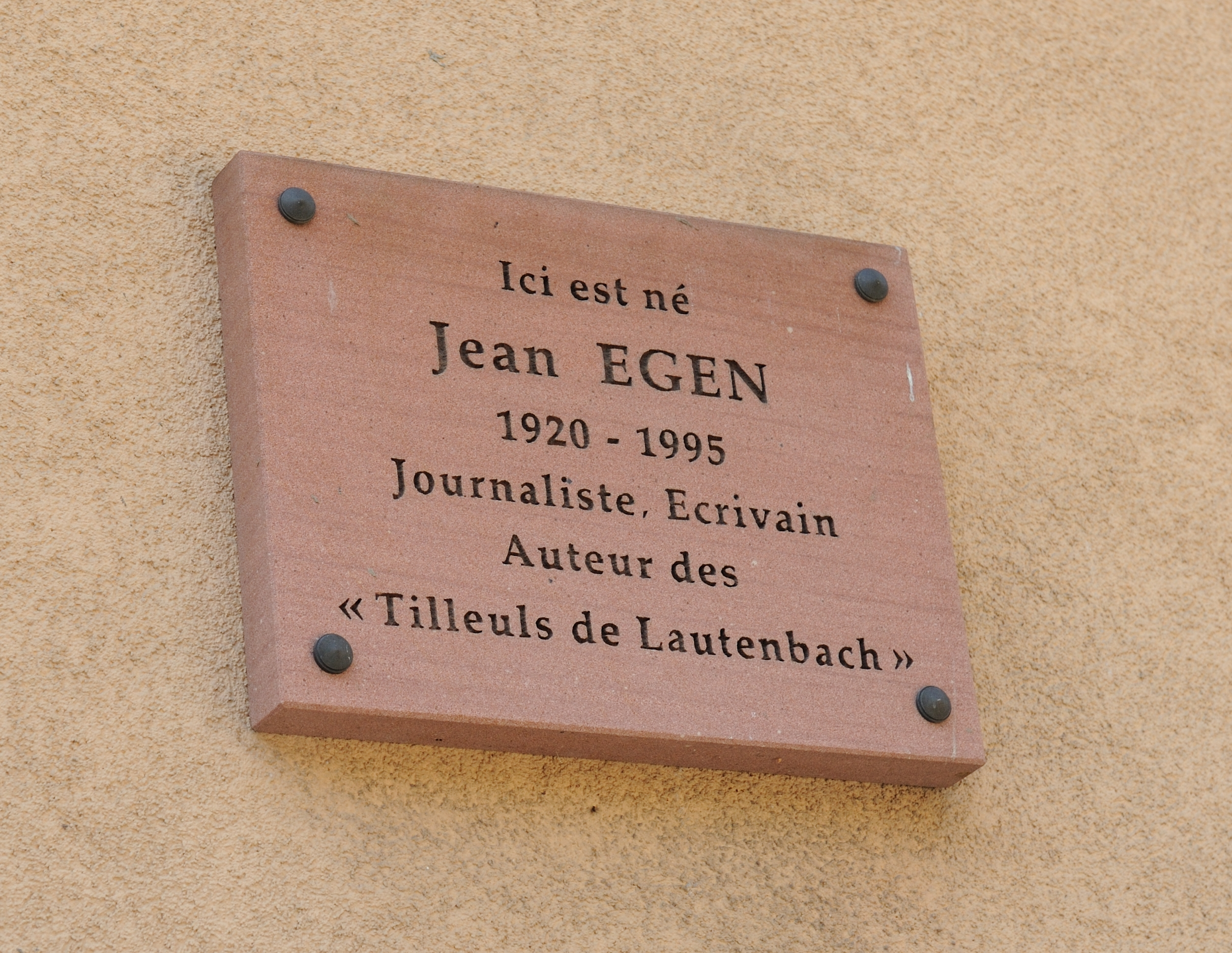 Hommage à Jean Egen, le jeangala du livre "Les tilleuls de Lautenbach"